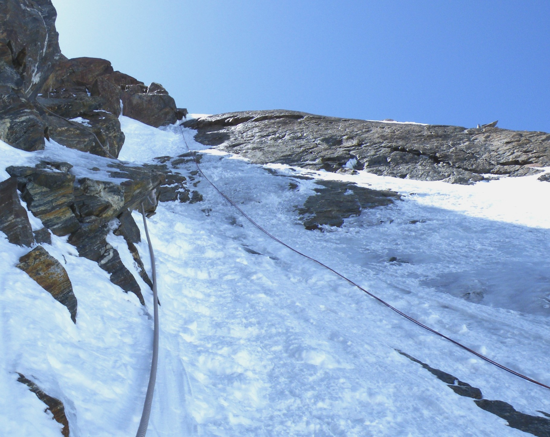 Dufourspitzen 150m korkea pohjoisseinämä